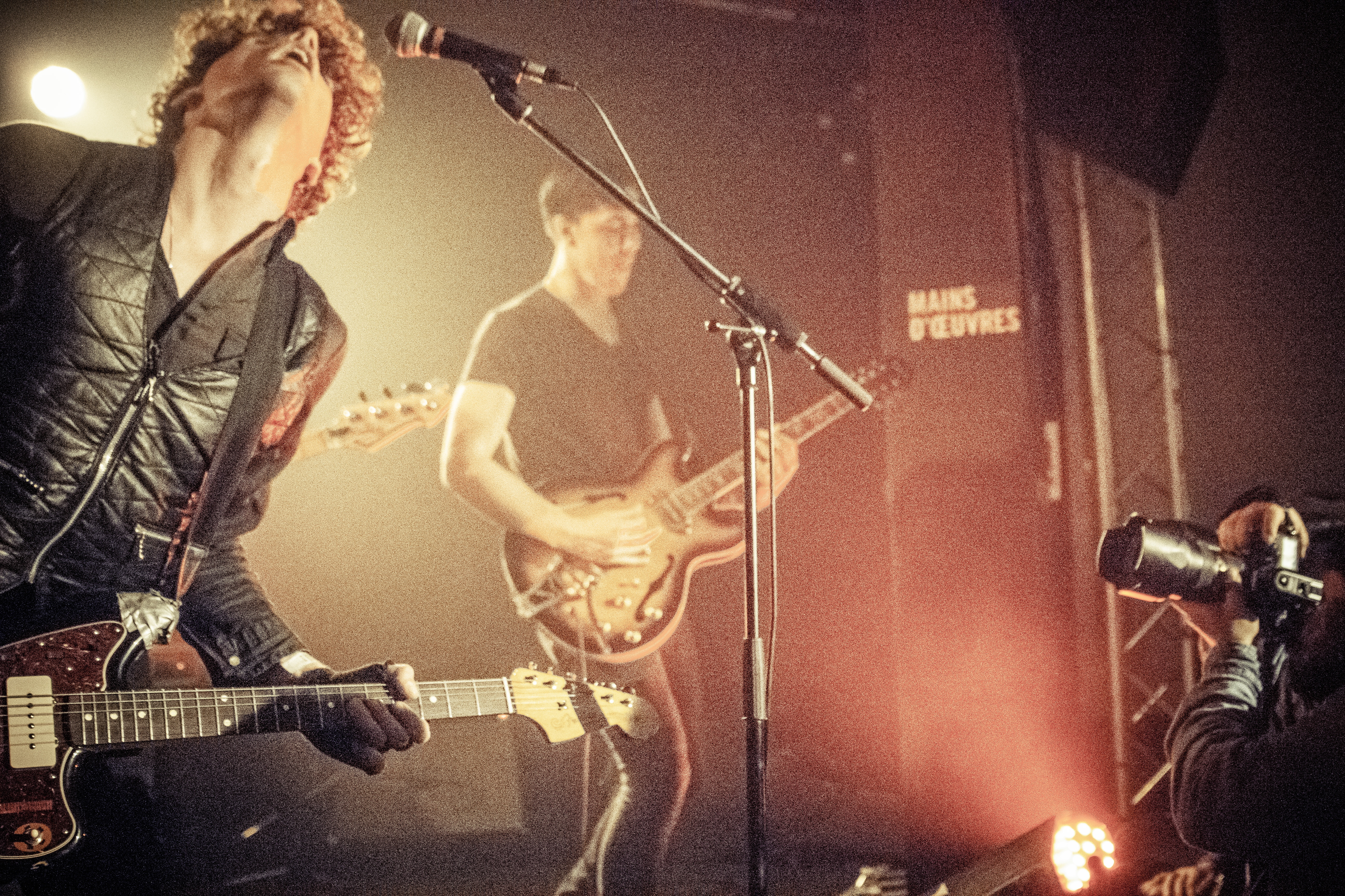 scène de concert